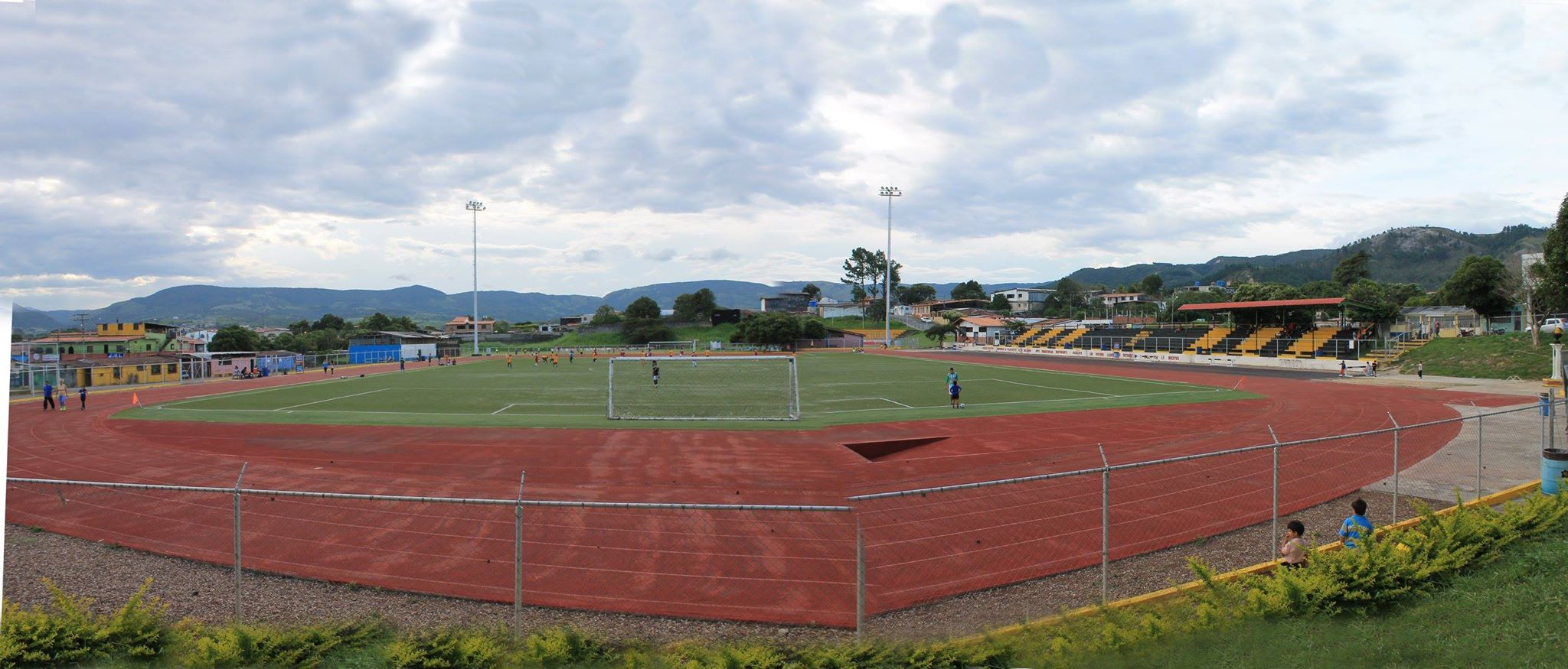 Vista Polideportivo tribuna principal.